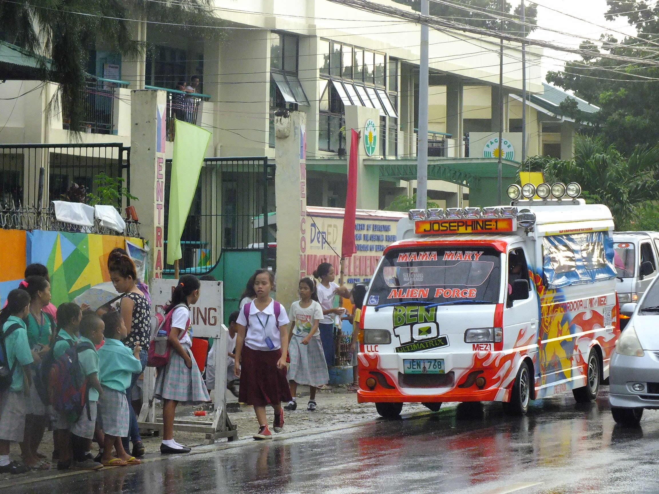 2016-09-29Jeepney in Mactan Cebu